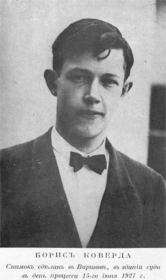 Borys Sofronowicz Kowerda